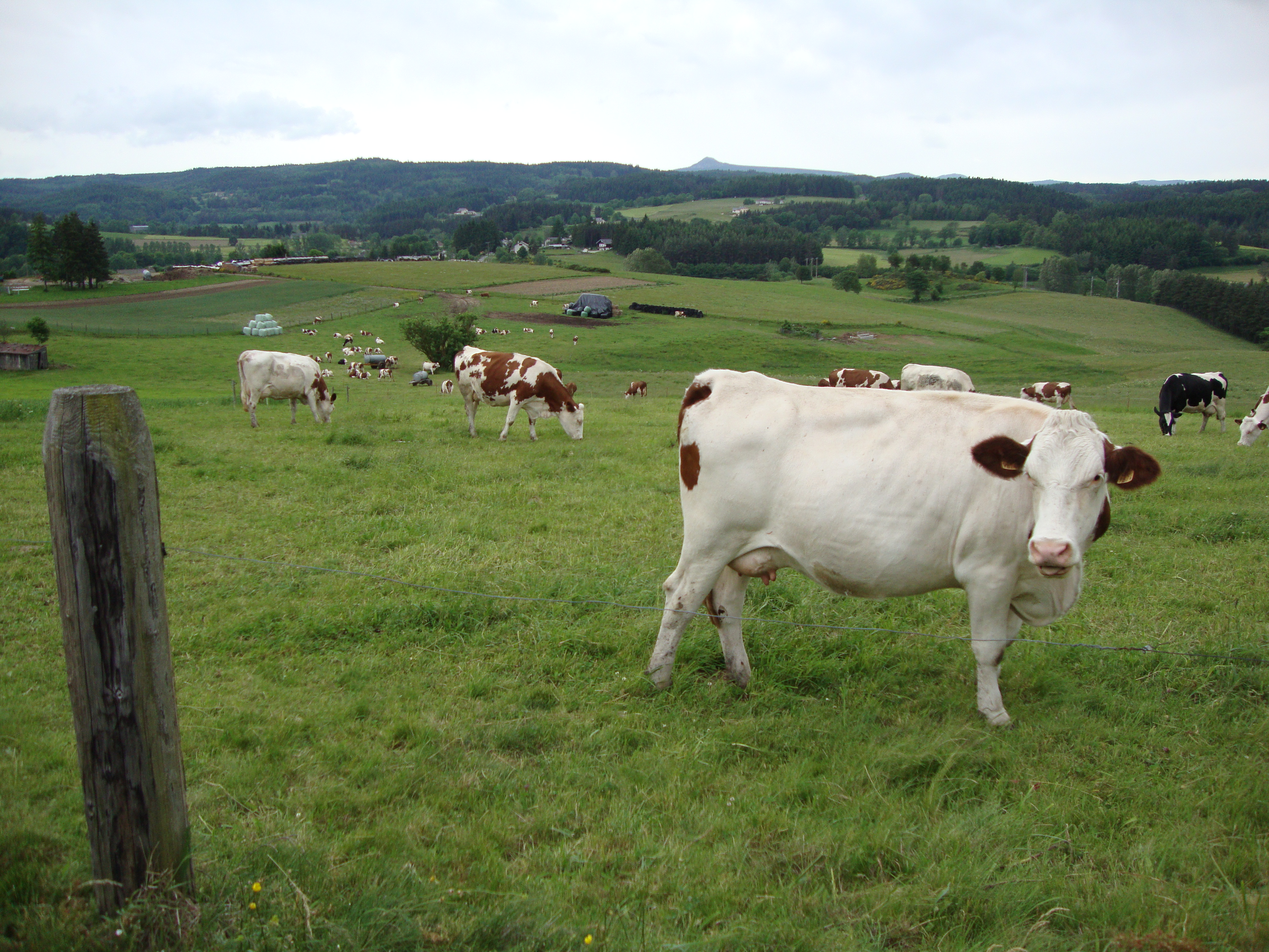 Tence (Haute-Loire, Fr) paysage avec vaches.